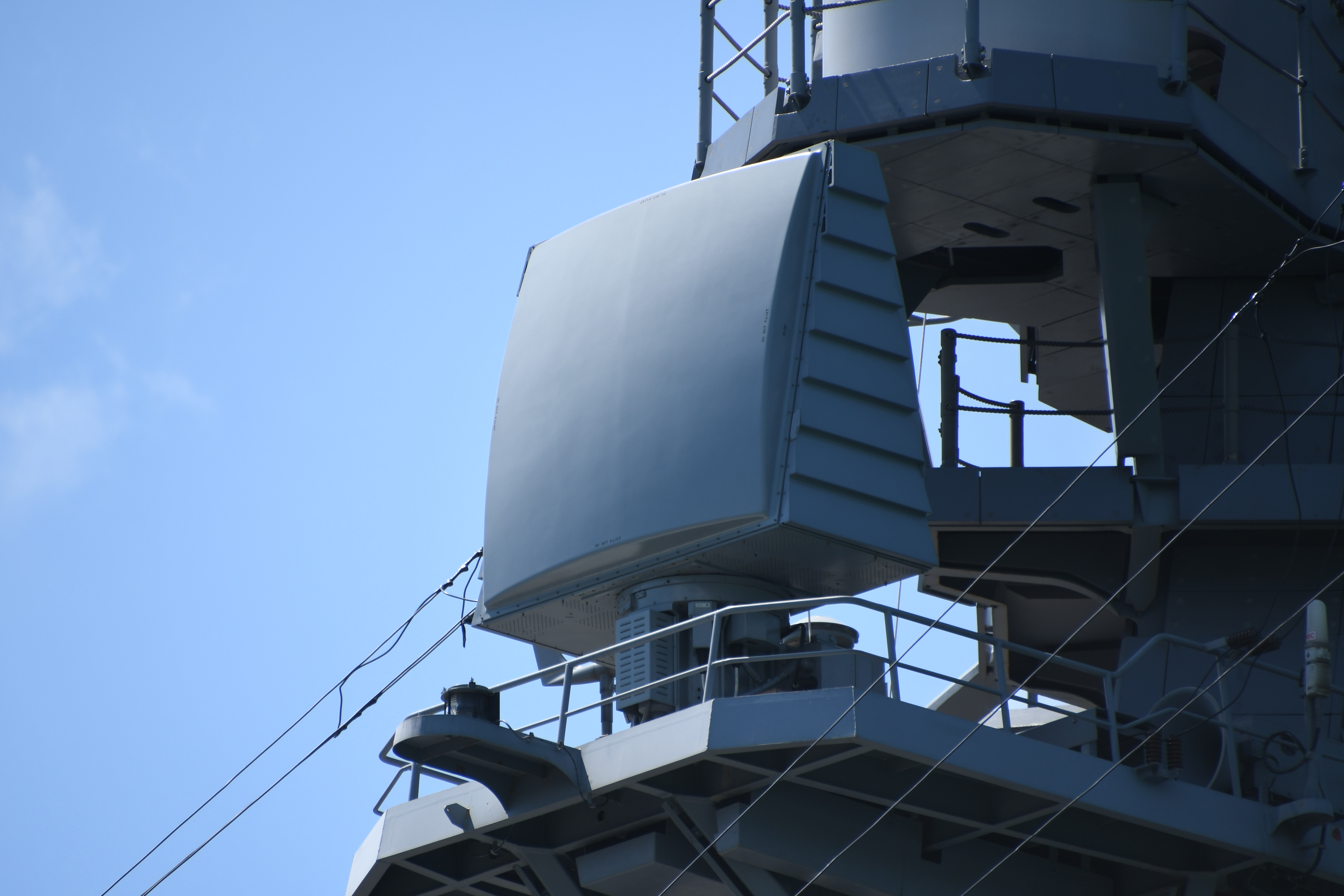 海上自衛隊 護衛艦あたご（DDG-177） マスト上のAN/SPQ-9B対水上レーダー 左舷前面。2019年4月13日 舞鶴基地にて。